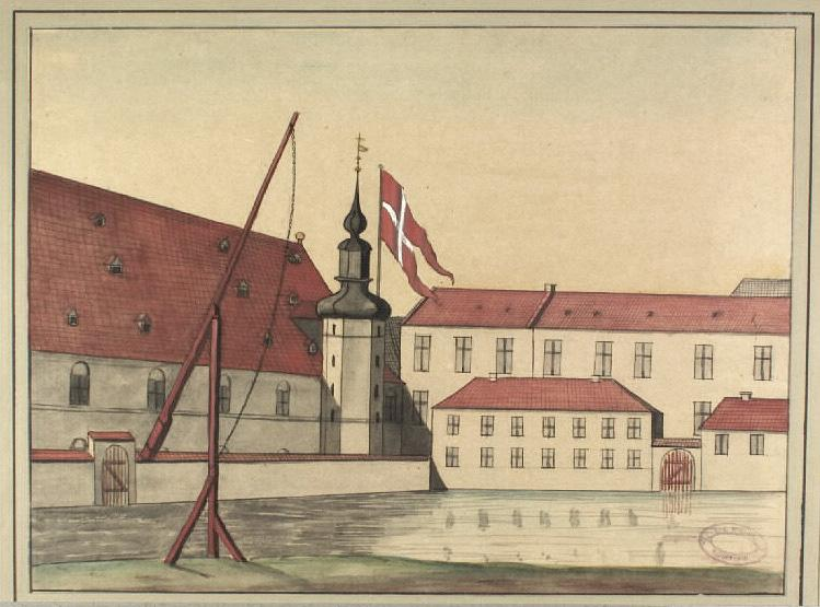 Proviantgården i København ca 1749. Håndkolorert